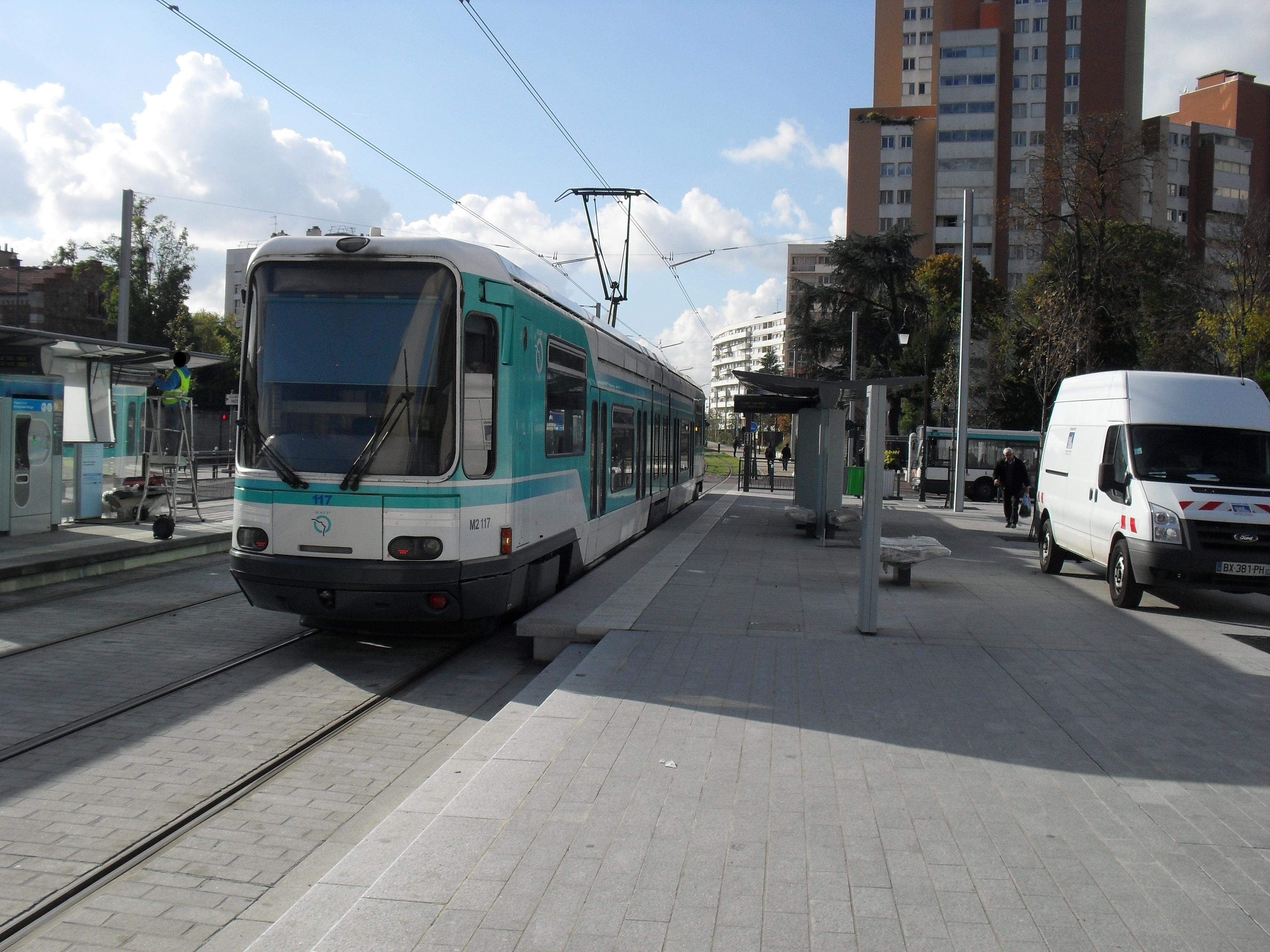 Paris Tramway ligne 1